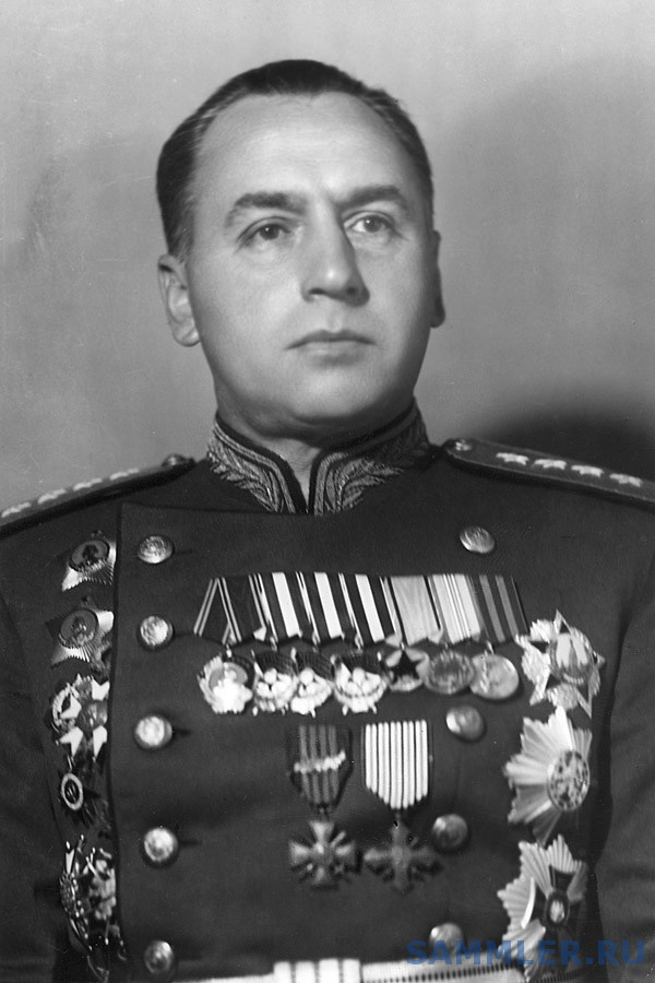 Алексей Иннокентьевич Антонов (1896 — 1962) — советский военачальник, генерал армии